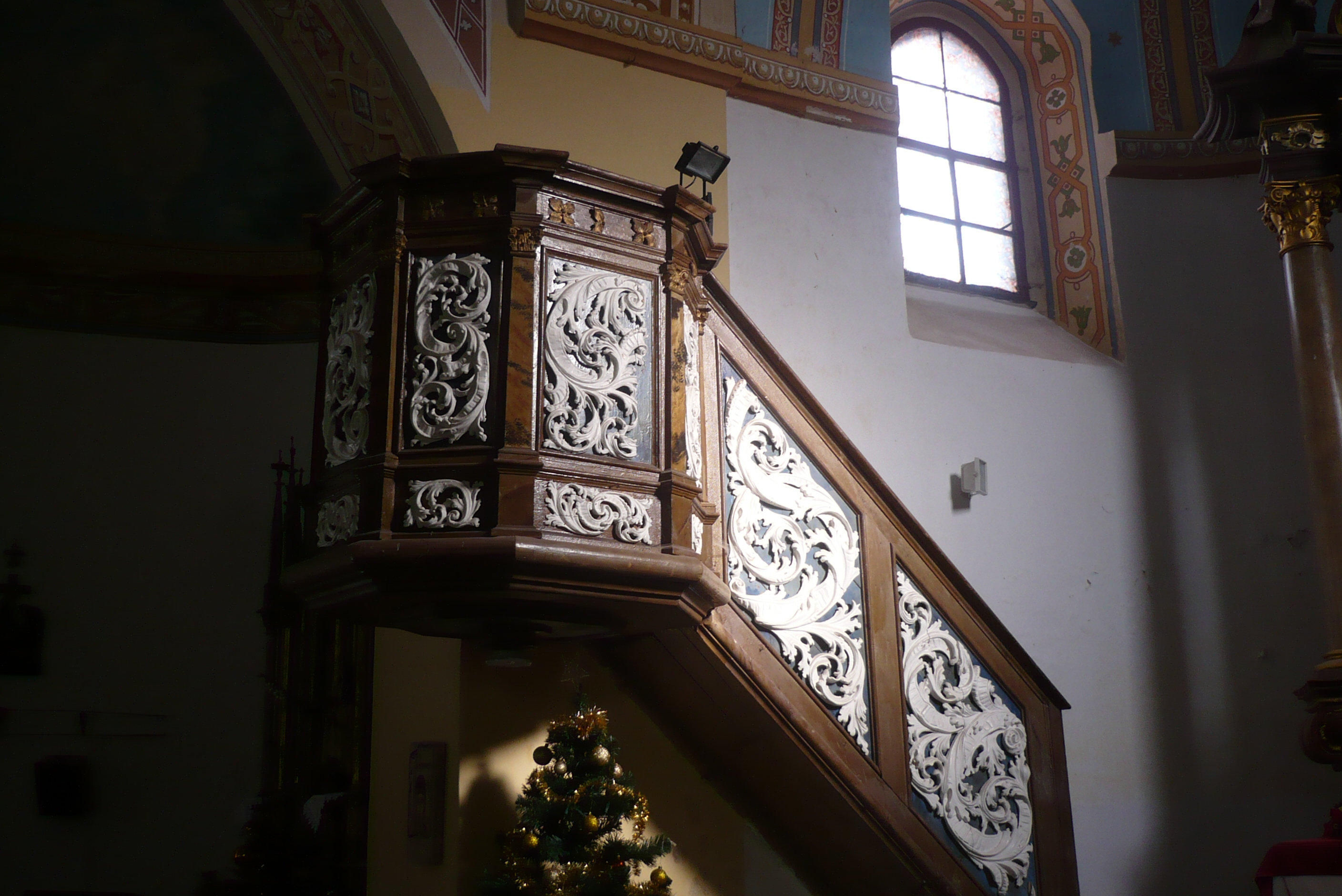 Ambona